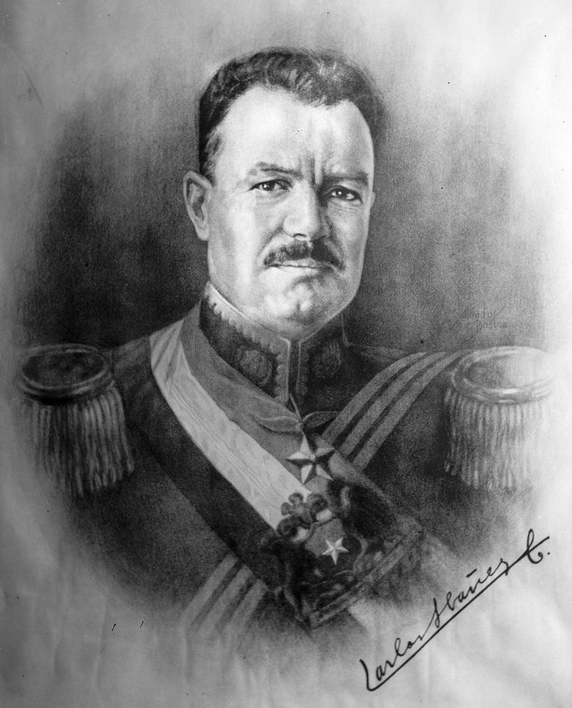 Sin fecha. Reproducción fotográfica tomada de un dibujo con el retrato del General Carlos Ibáñez del Campo en su primer mandato.